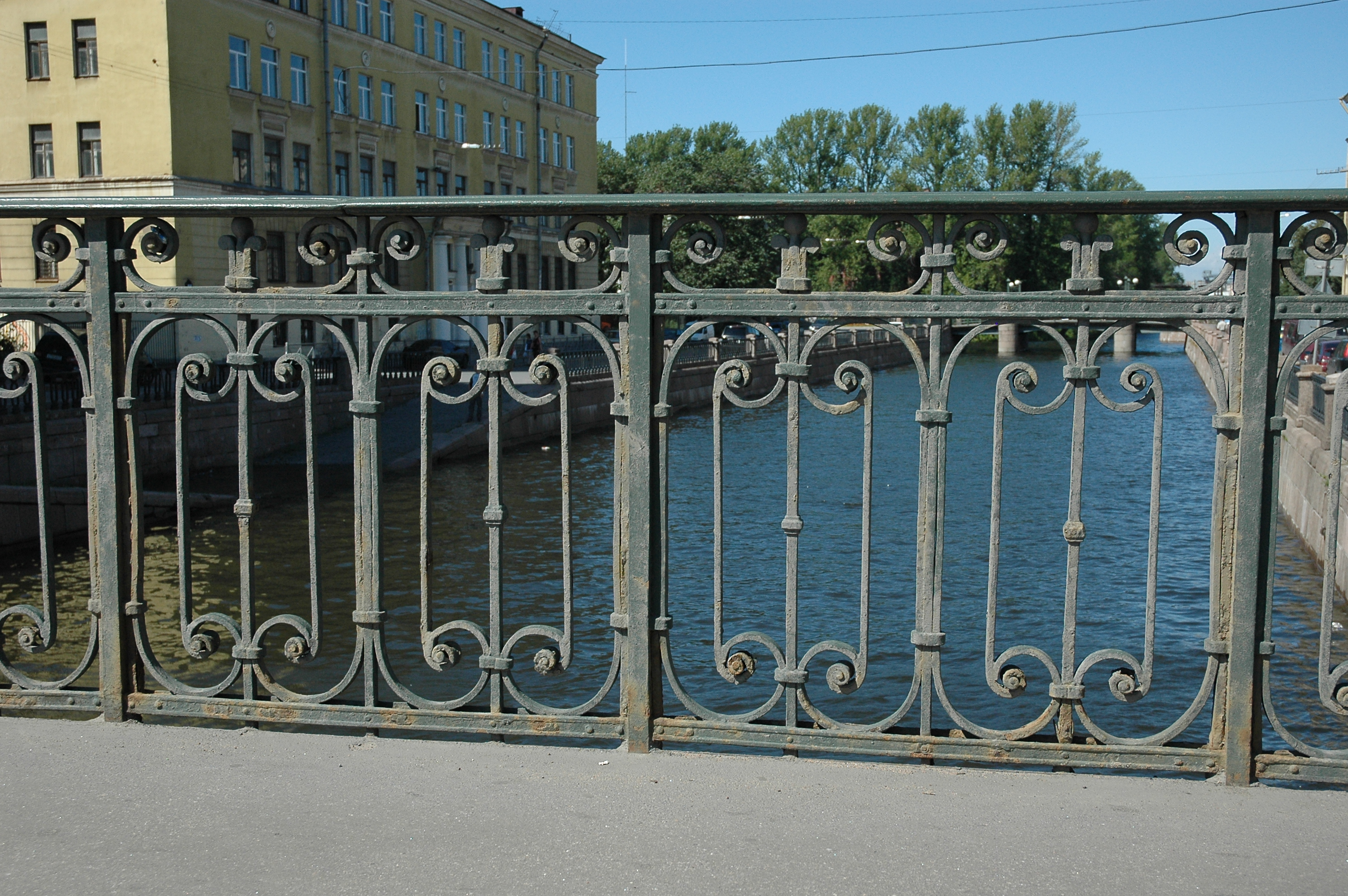 Dekabristov bridge across Kriukov canal (St Petersburg), fence